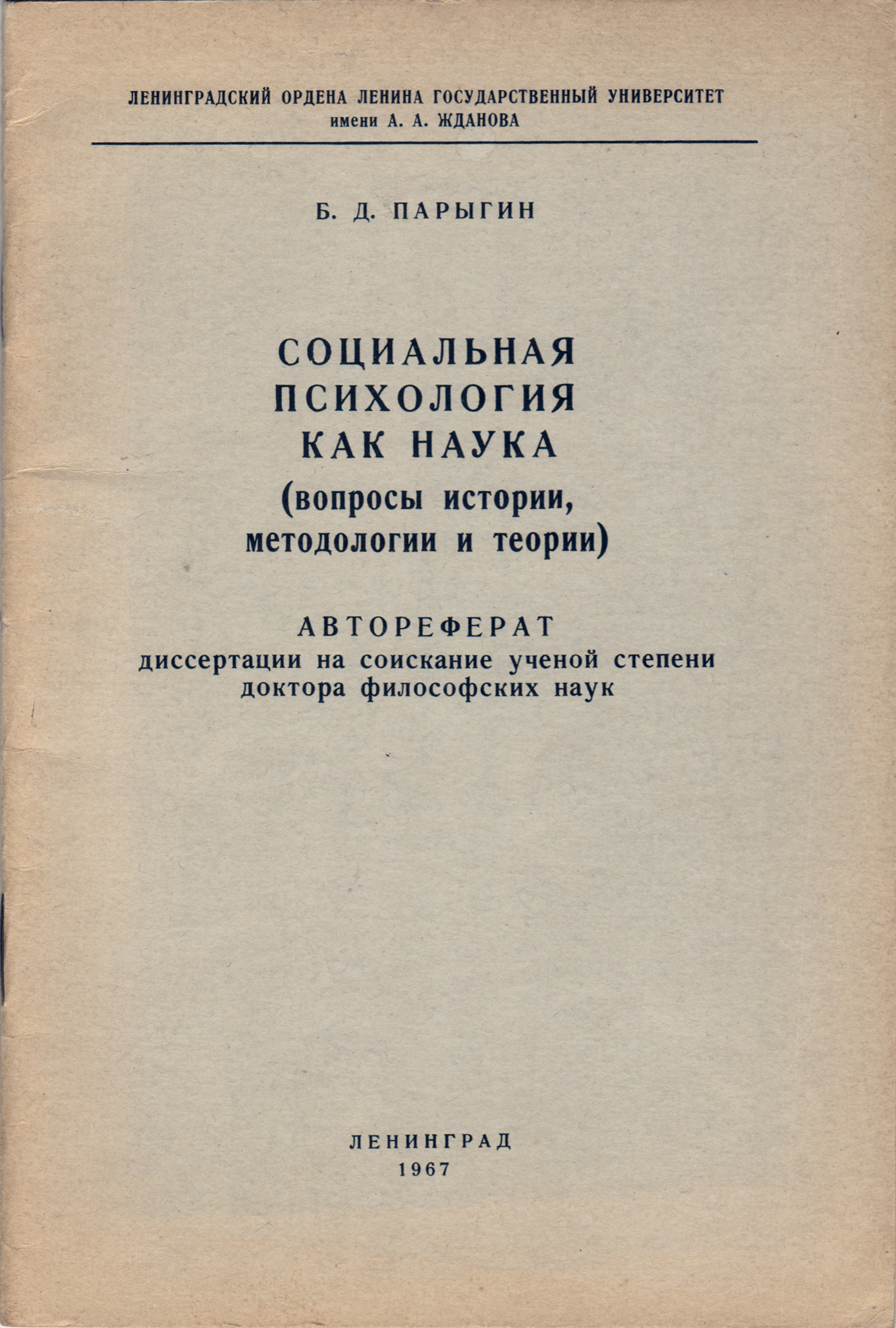 Б. Д. Парыгин Социальная психология как наука. Обложка автореферата. ЛГУ, 16 с. 20 х 14 см. Тираж - 200 экз.